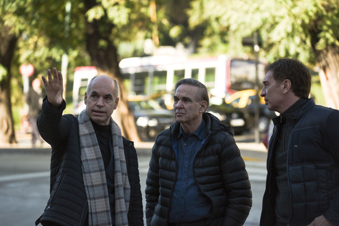 Horacio Rodríguez Larreta y Diego Santilli recorrieron con el senador Miguel Ángel Pichetto el Viaducto Mitre